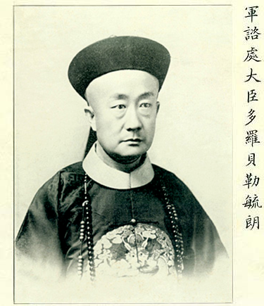 愛新覺羅·毓朗